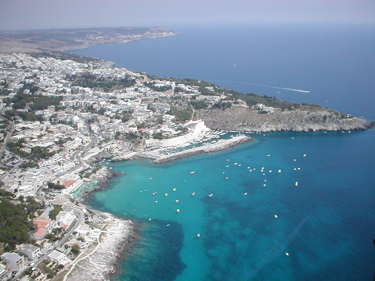 Vista area della città di Castro